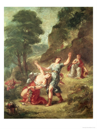 Orpheus